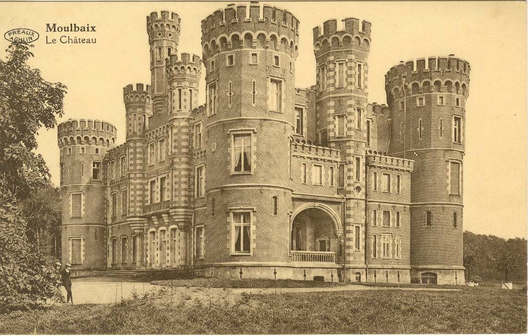 Château de Moulbaix en 1900